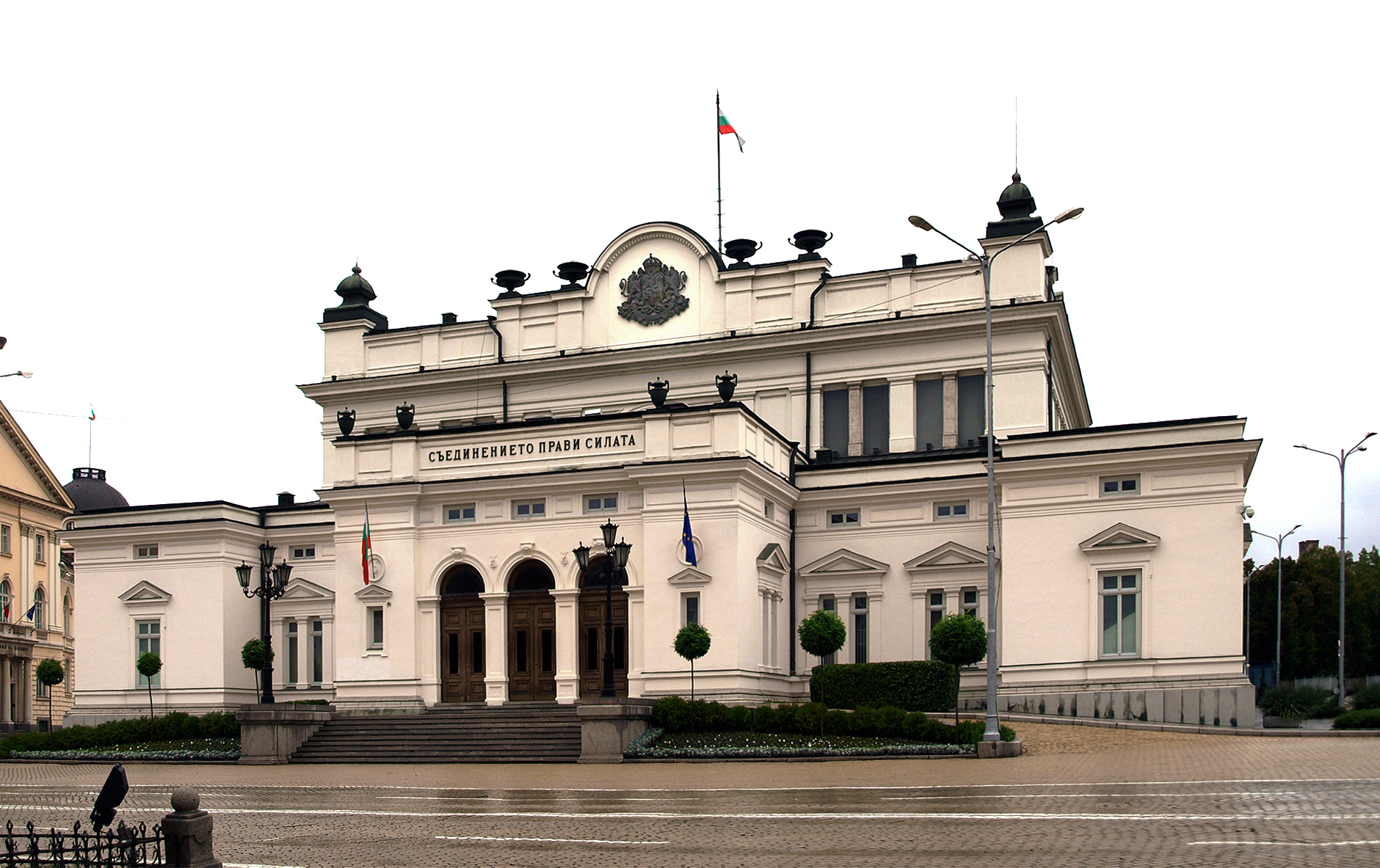 Bulgarian Parliament, Sofia, Bulgaria